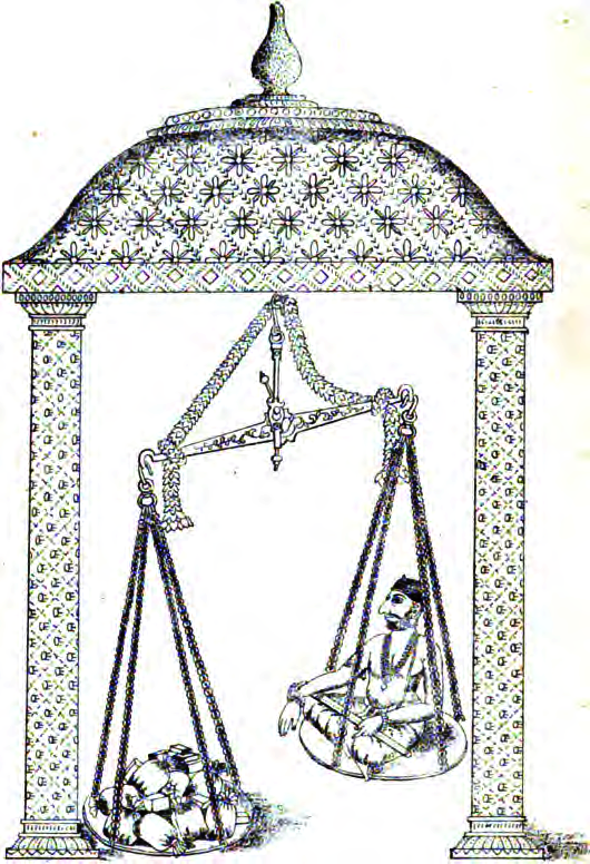 Marthanda Vurmah Maha Raja Performing Thulapurusha Danum